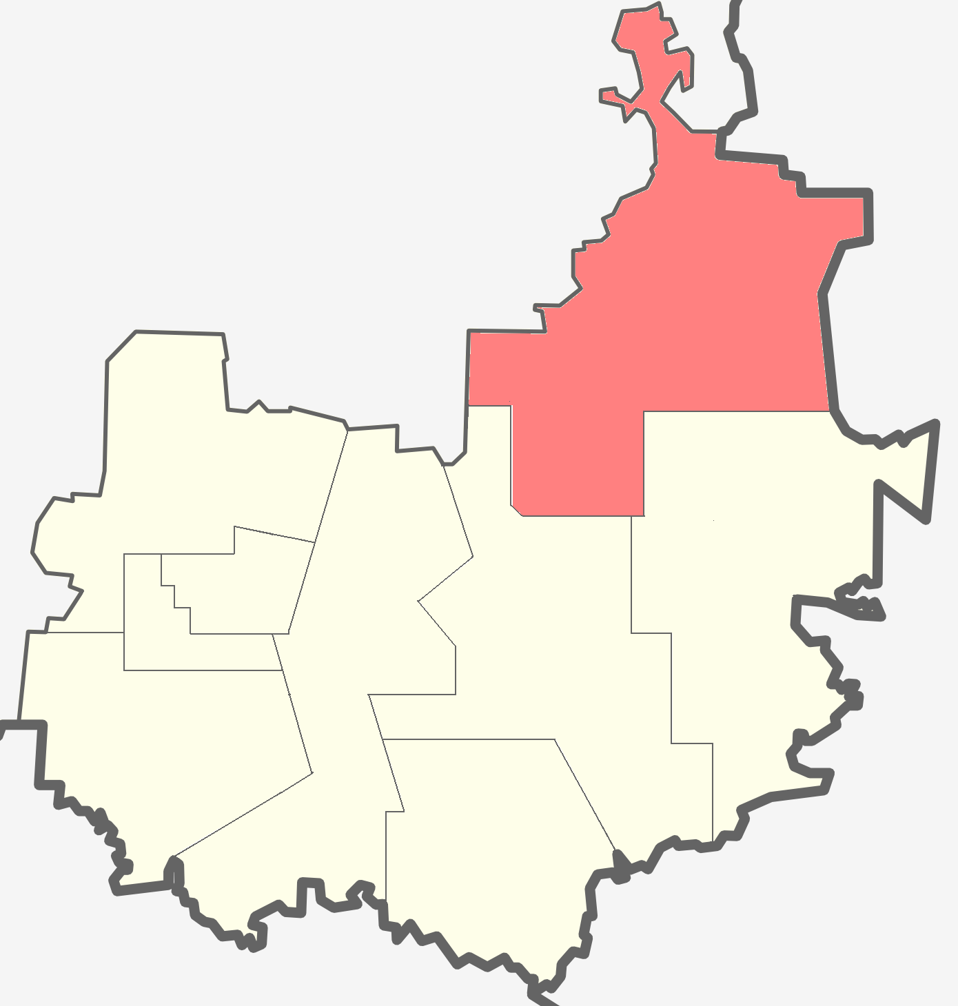 Радогощинское сельское поселение на карте Бокситогорского района Ленинградской области.